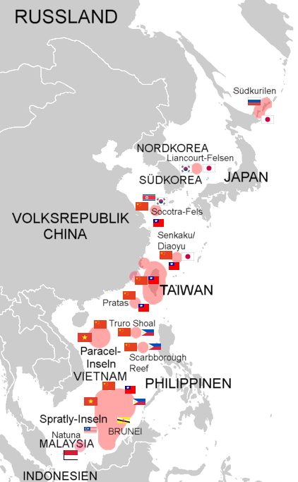 Umstrittene Inseln in Ostasien